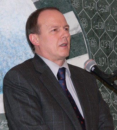 dr. Enes Karić na tribini u džematu Aachen, SR Njemačka, 19. marta 2006. god.